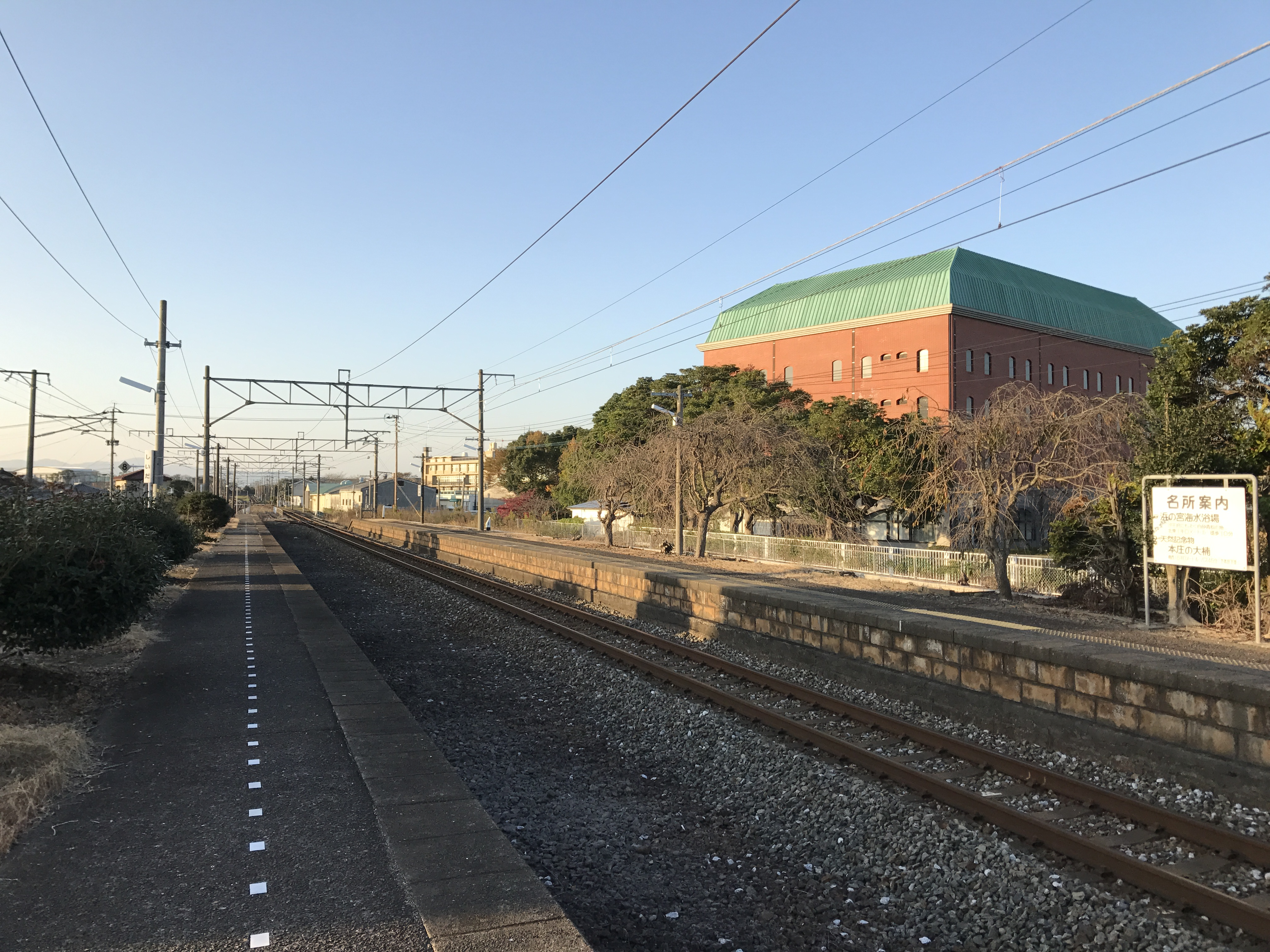 椎田駅のホーム(奥は築城方面)。右側の建物は築上町図書館